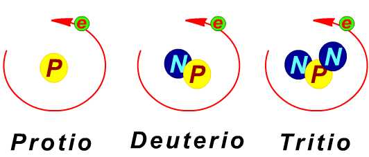 hidrogenoaren isotopoen diagrama